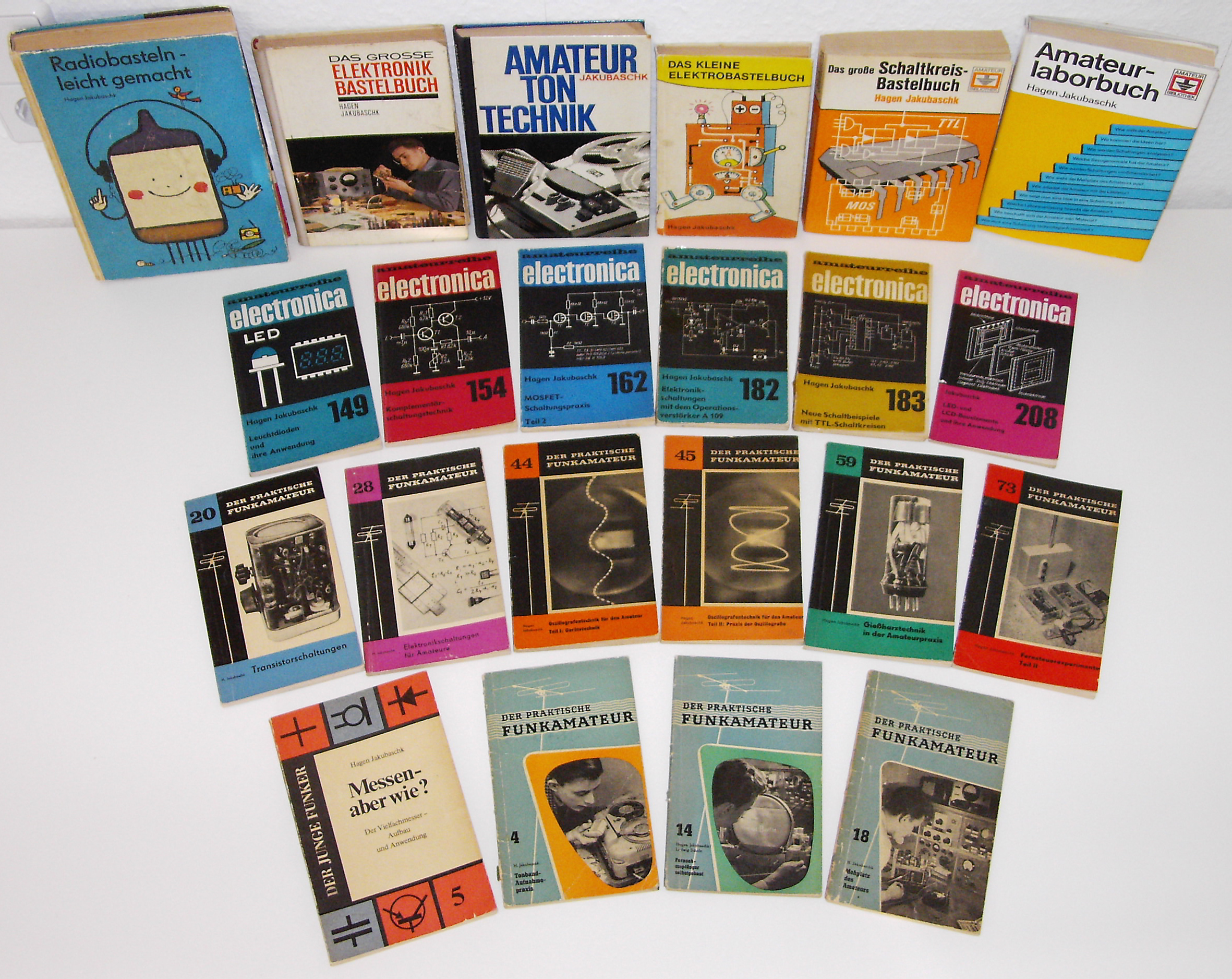 A collection of books and booklets by Hagen Jakubaschk